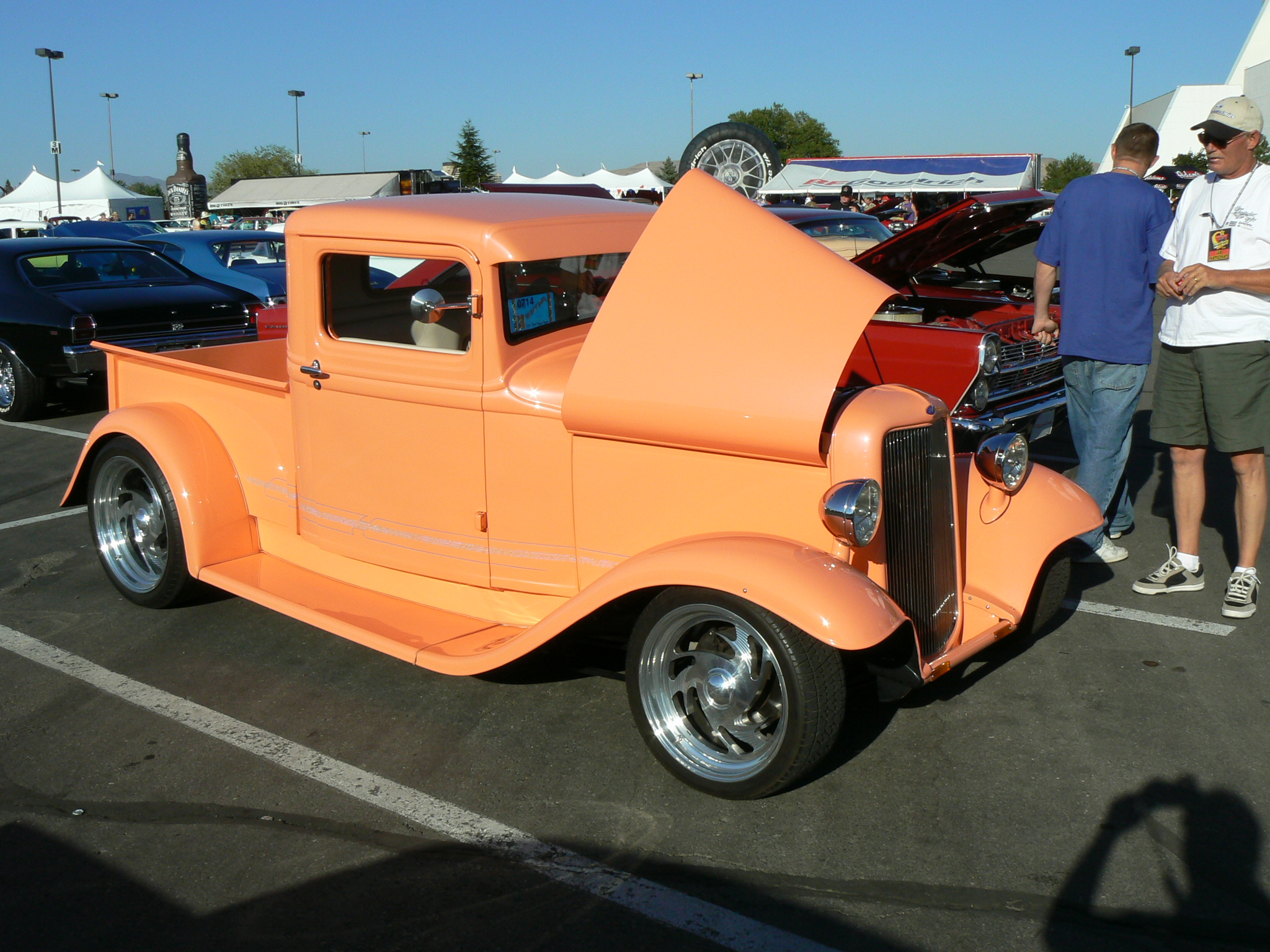 תצוגת מכוניות ישנות ברינו. צילם י.ש. 10:26, 17 באוגוסט 2006 (IDT)